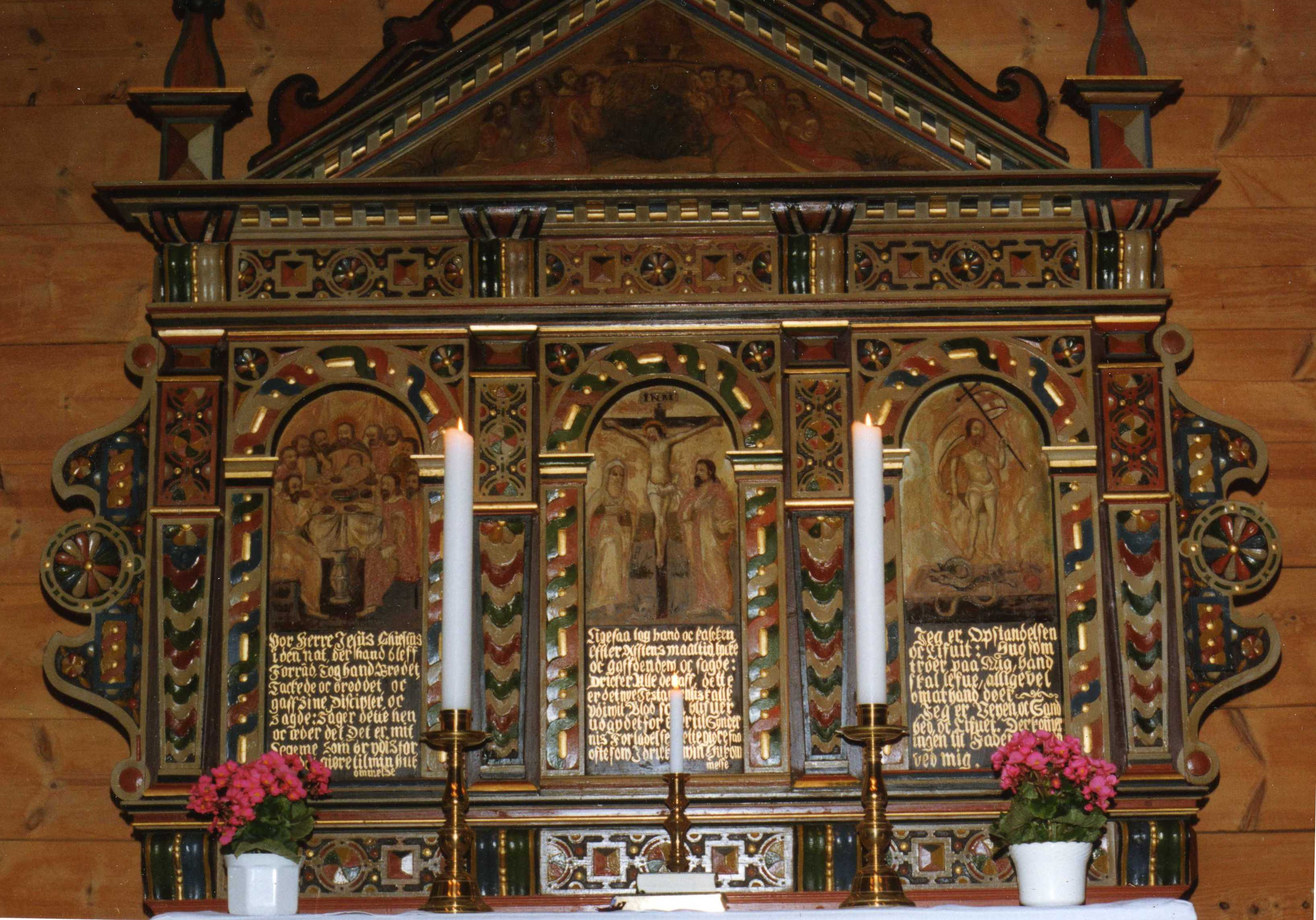 Altertavlen i Viksdalen kirke, Altar Piece in Viksdalen Church